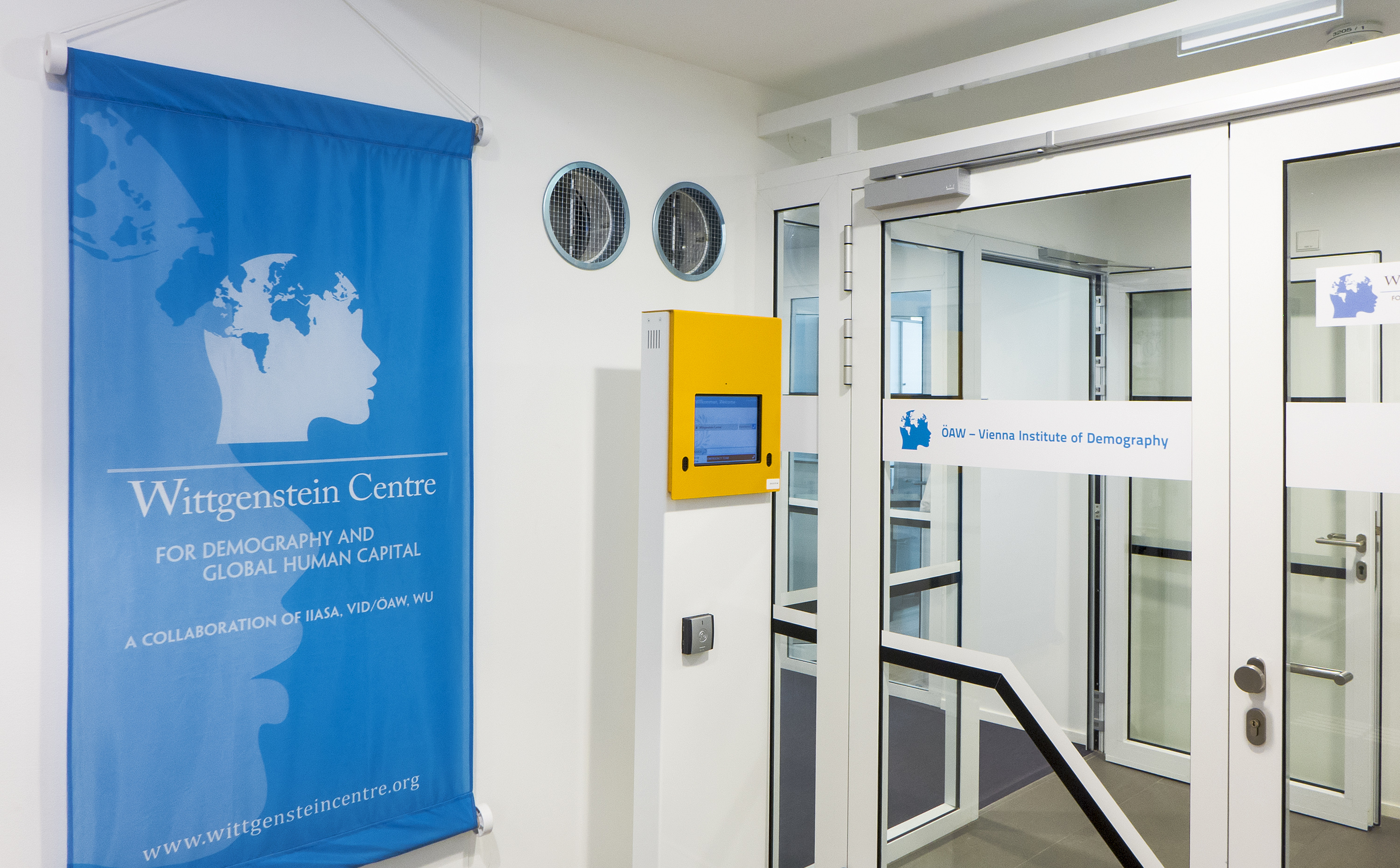 Vienna Institute of Demography in Wien 2